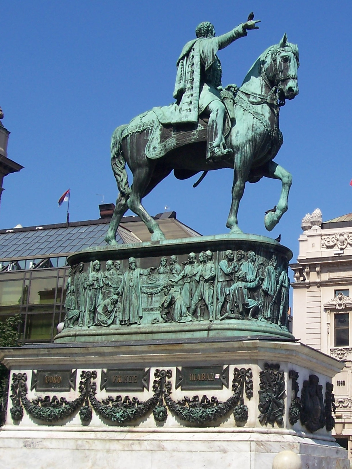 Памятник Михаилу Обреновичу на площаде Республики (Белград)